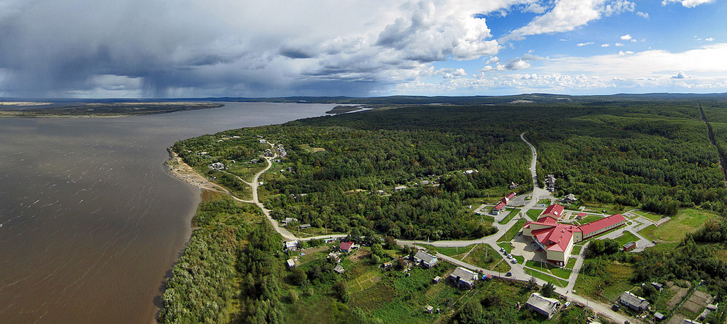 Вид на Сикачи-Алян, Хабаровский край